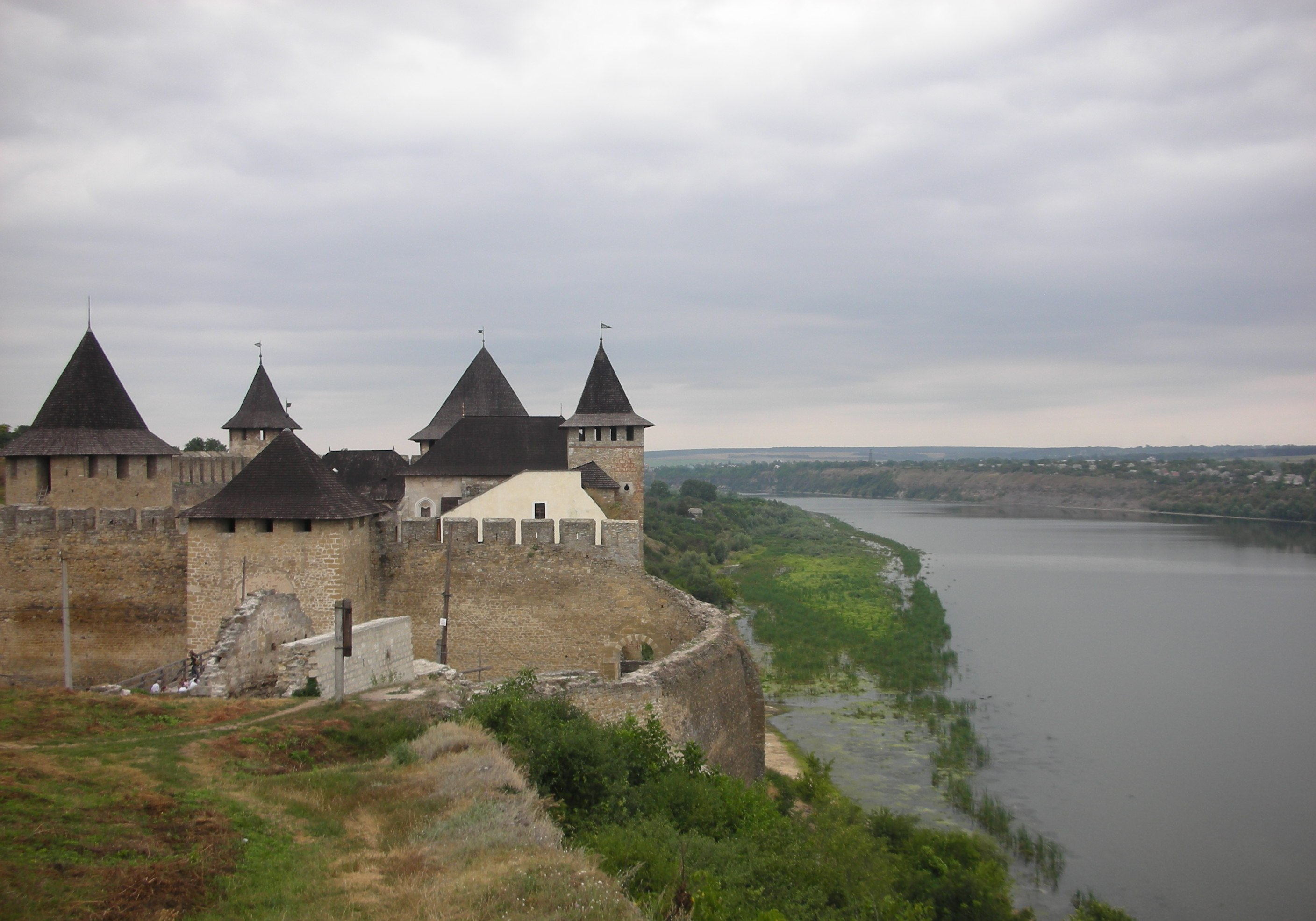 Комплекс споруд фортецi (мур.), Хотин